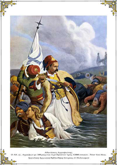 Αθανάσιος Αγραφιώτης. Ο Αθανάσιος εξ Αγράφων με 500 μάχεται περί Προύτον προς 12000 ιππικόν.